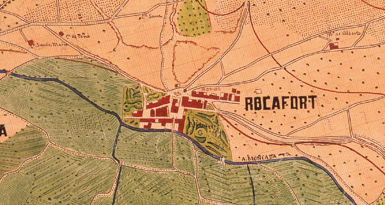 Rocafort el 1883 (el nord està a la dreta).